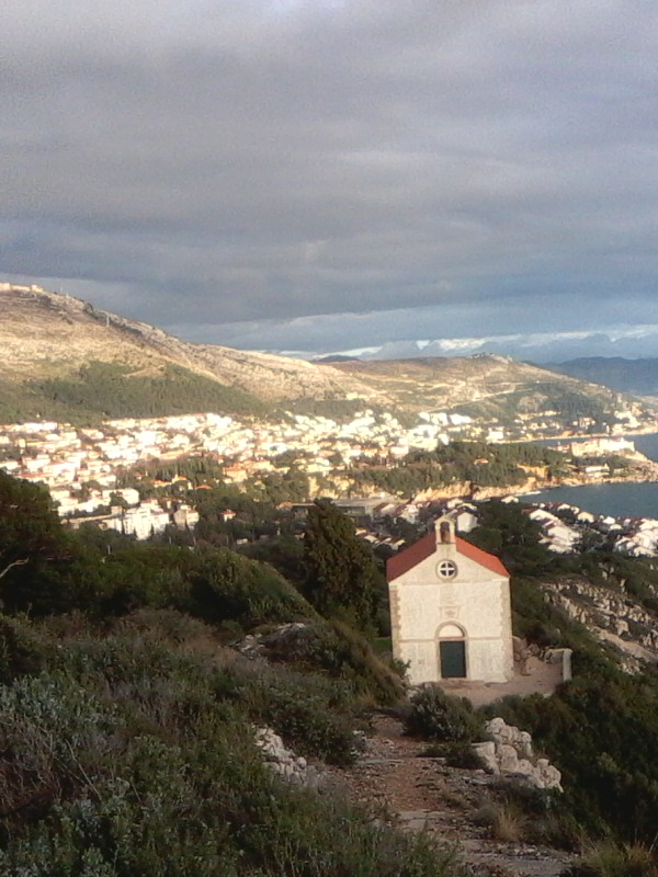 dubrovačka Crkva sv. Vlaha na Gorici